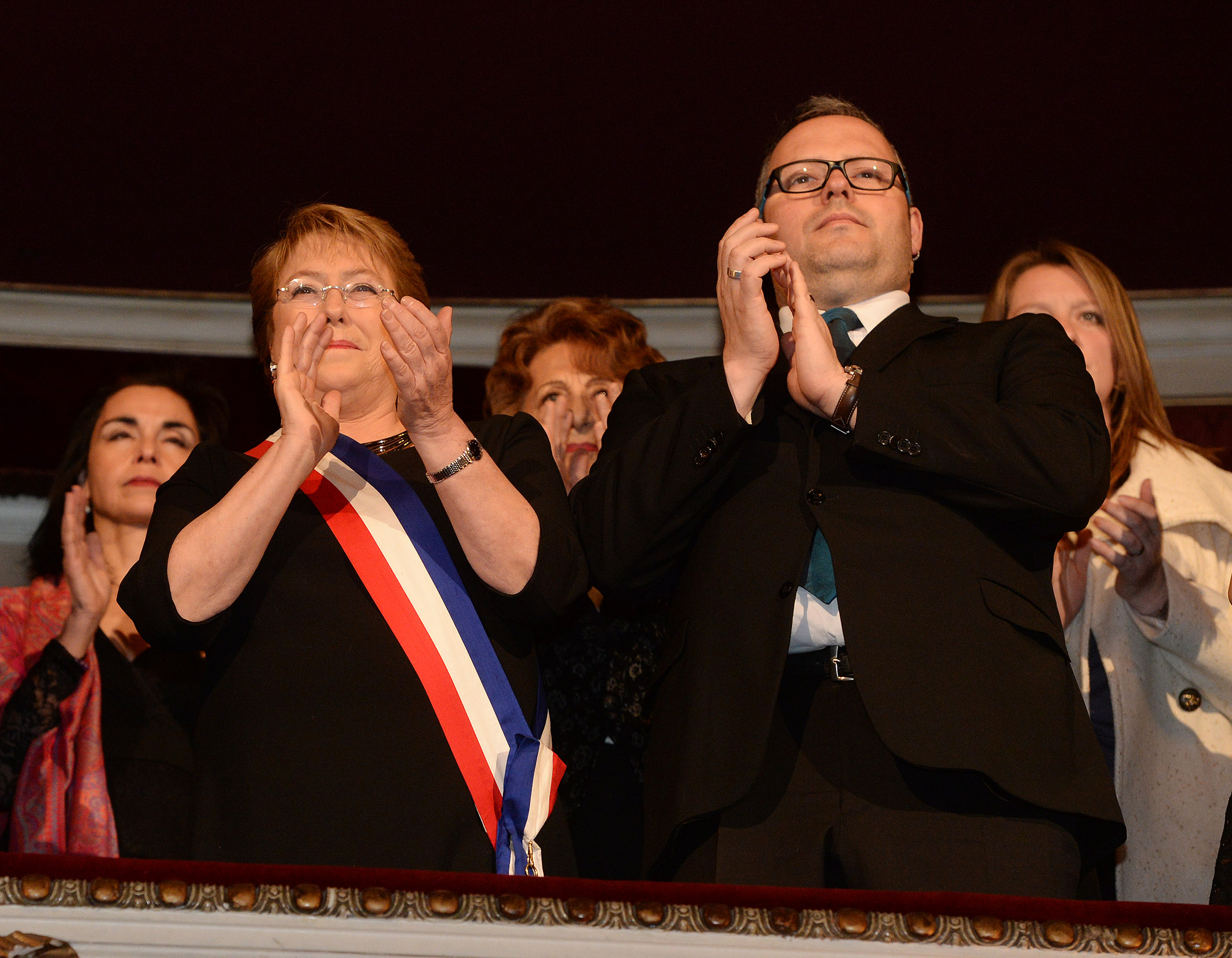 Presidenta Michelle Bachelet, asiste a la función de Gala con motivo de la celebración del 204º aniversario nacional, oportunidad en la que se presentará un Concierto sinfónico-coral